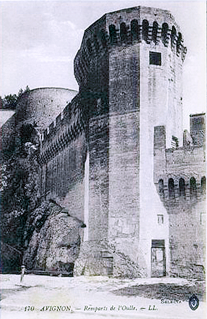 Tour épaulant les remparts face au Rhône